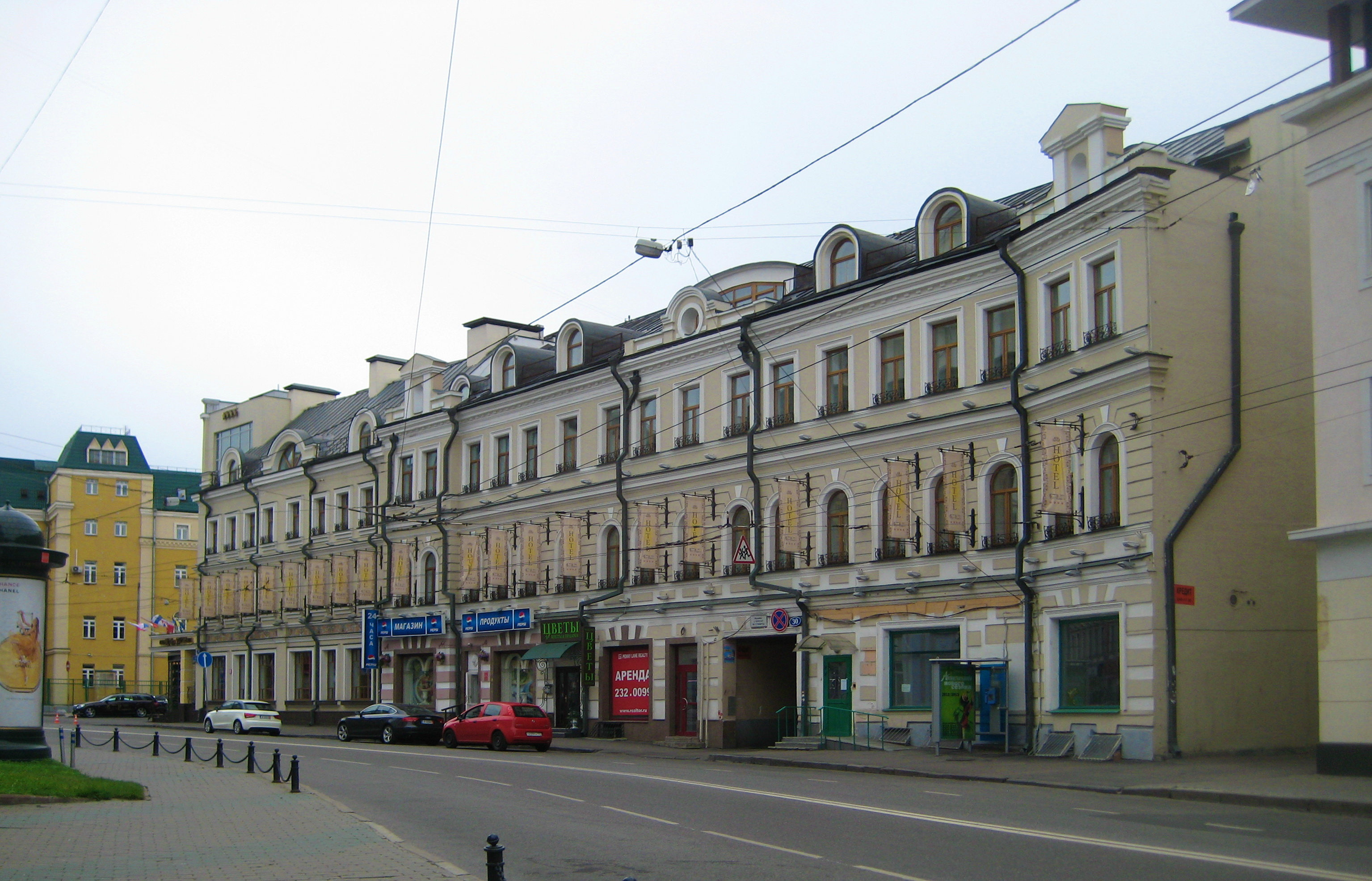 Остоженка